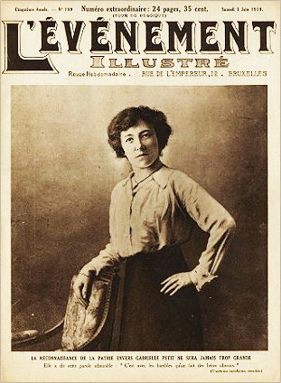 Journal illustré du 7 juin 1919 consacré à Gabrielle Petit (1893-1916)